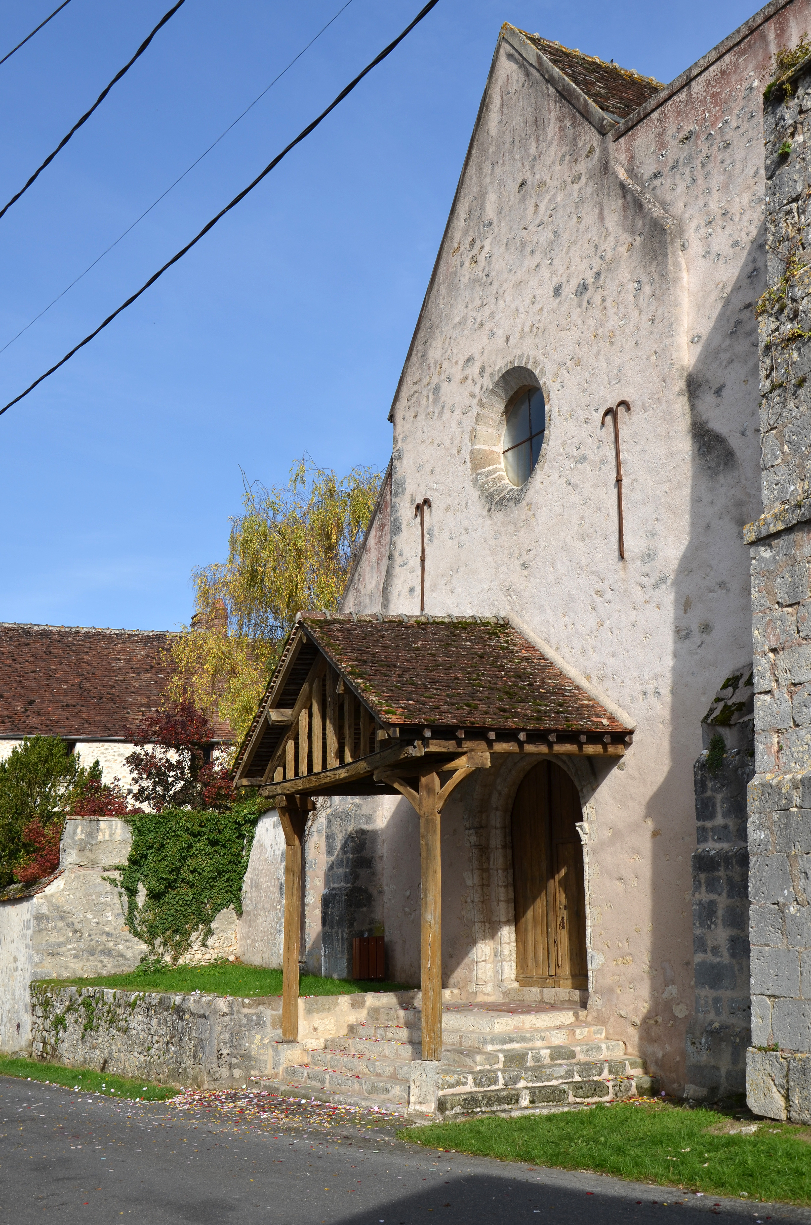 Eglise de Chalautre-la-Petite, Seine-et-Marne, Ile de France, France